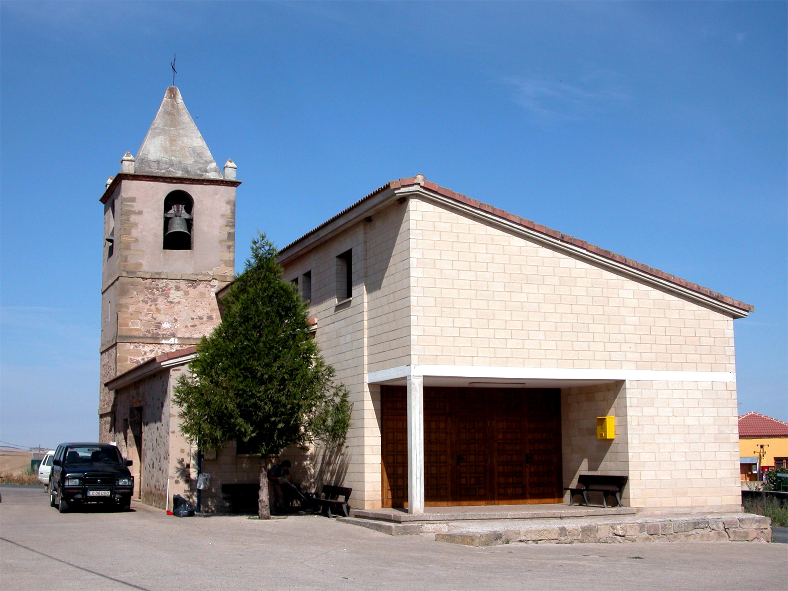 Iglesia de San Millán en Ciriñuela, aldea de Cirueña (La Rioja - España).